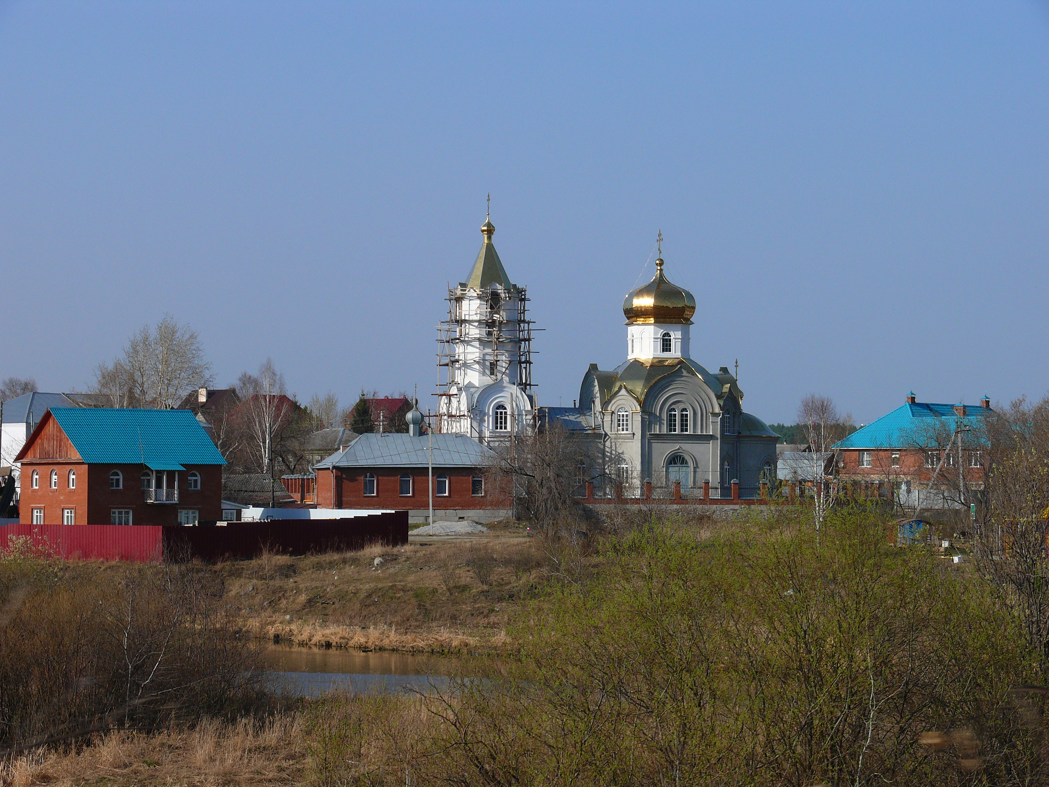 Старопышминская церковь (Свердловская область, Берёзовский, р. п. старопышминск)